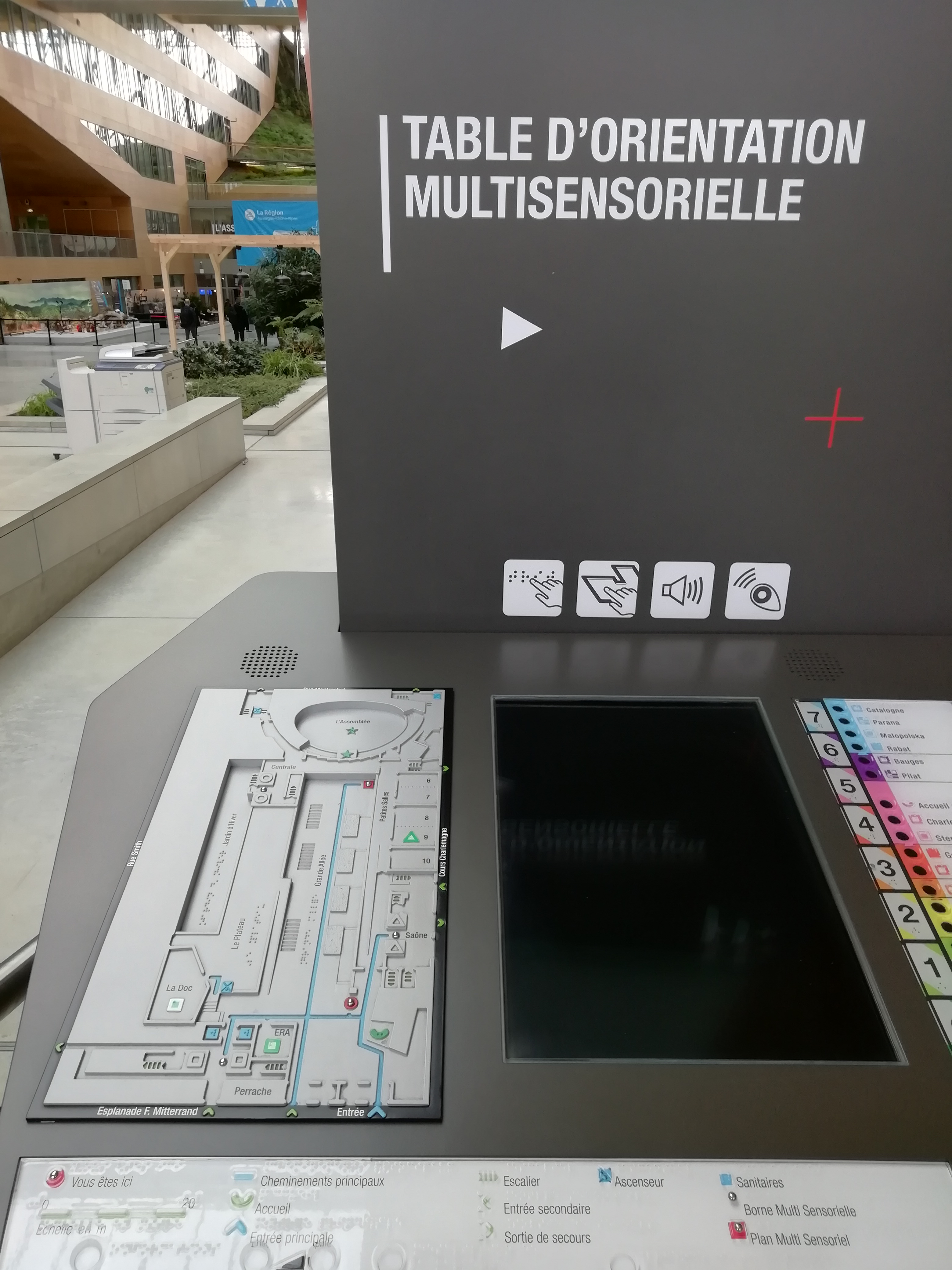 Table d'orientation en intérieur de bâtiment public, d'assistance envers tout handicap